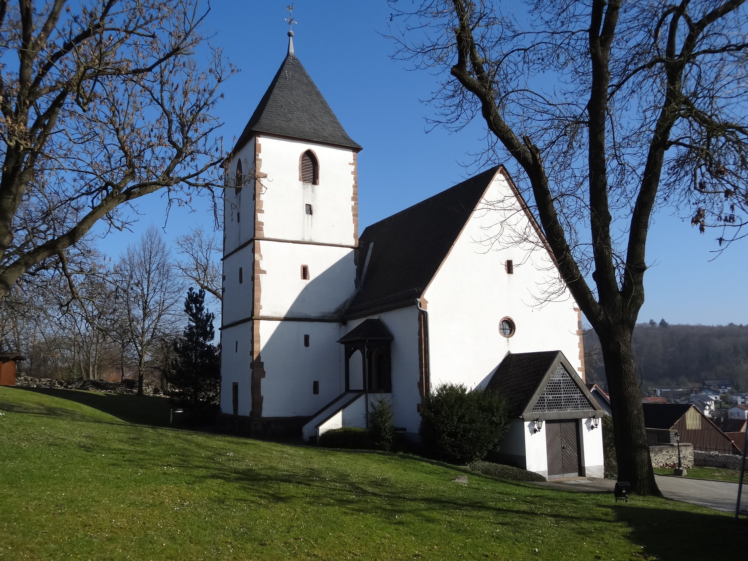 Evangelische Pfarrkirche Ober-Widdersheim